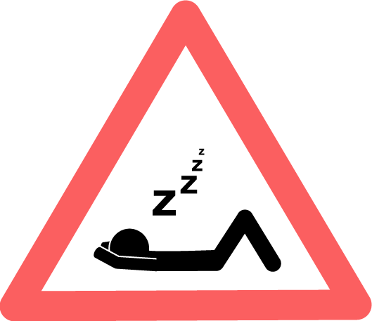 Panneau "Attention" avec pictogramme en sommeil